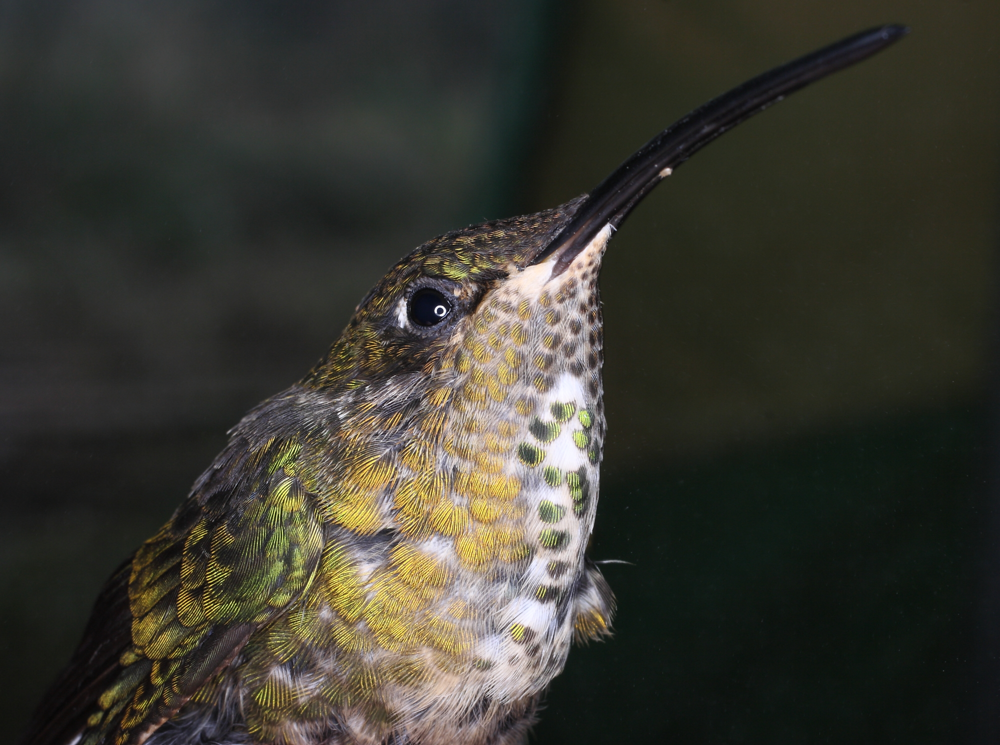 Portachuelo, PN Páramos El Batallón y La Negrea, Tovar-Guaraque, Mérida eBird checklist